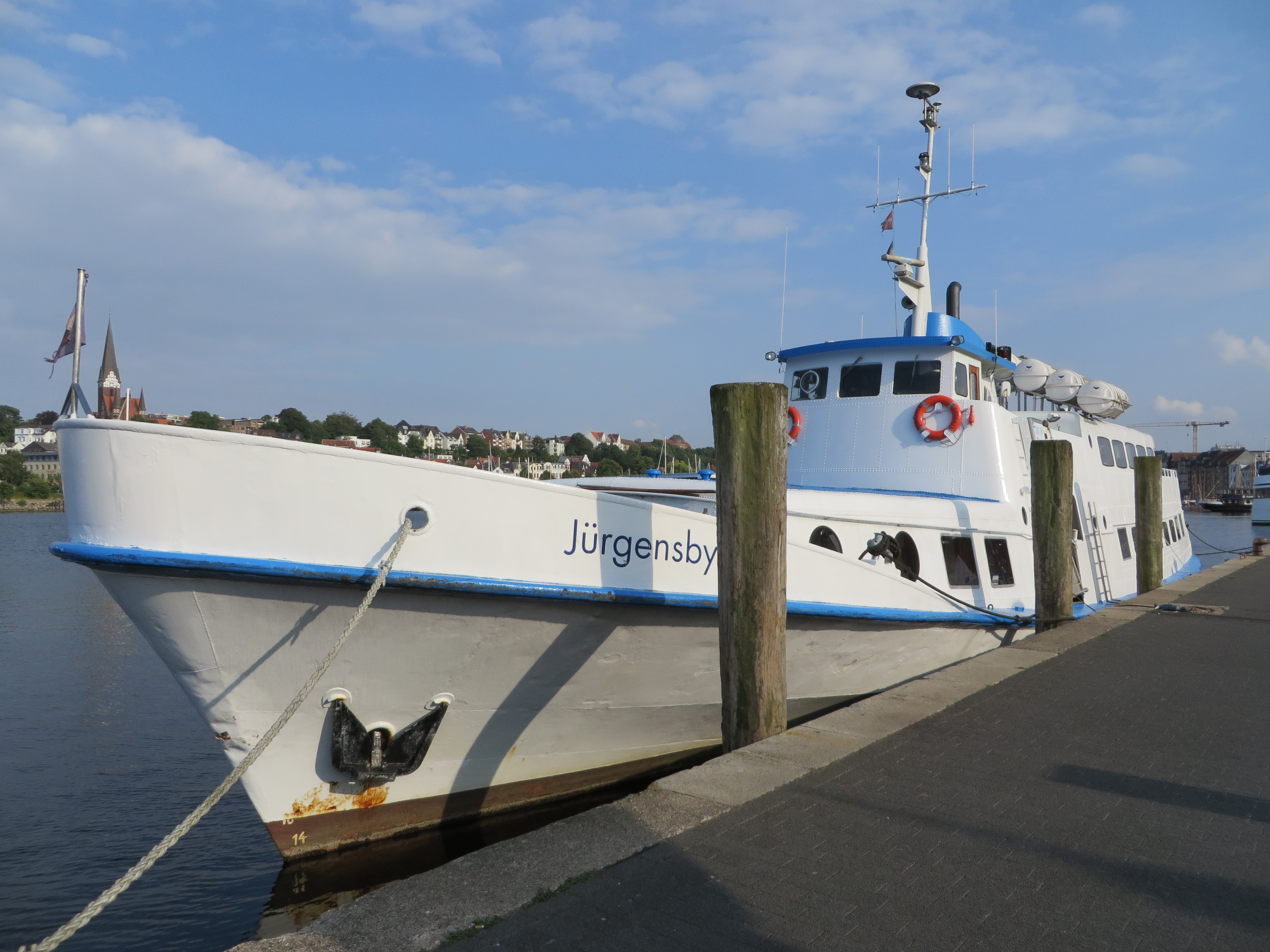 Jürgensby Schiff (Flensburg 31 Juli 2014)